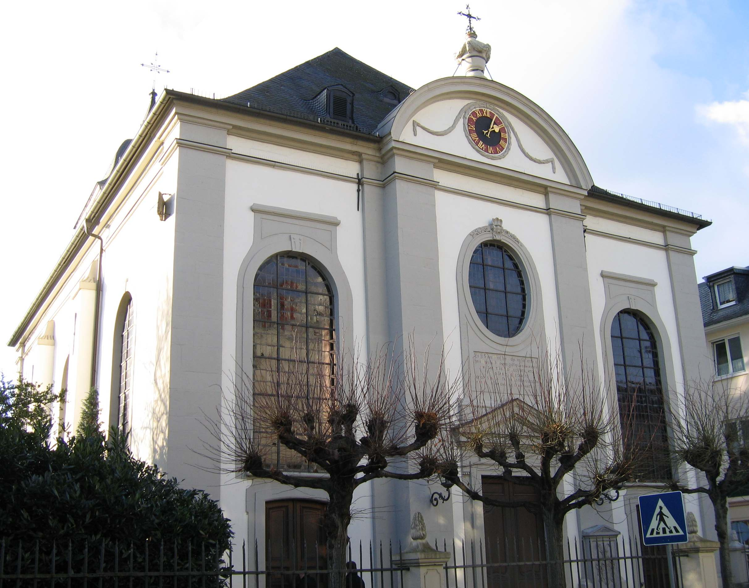 Katholische Kirche von Königswinter, Sankt Remigius, Eingangsseite